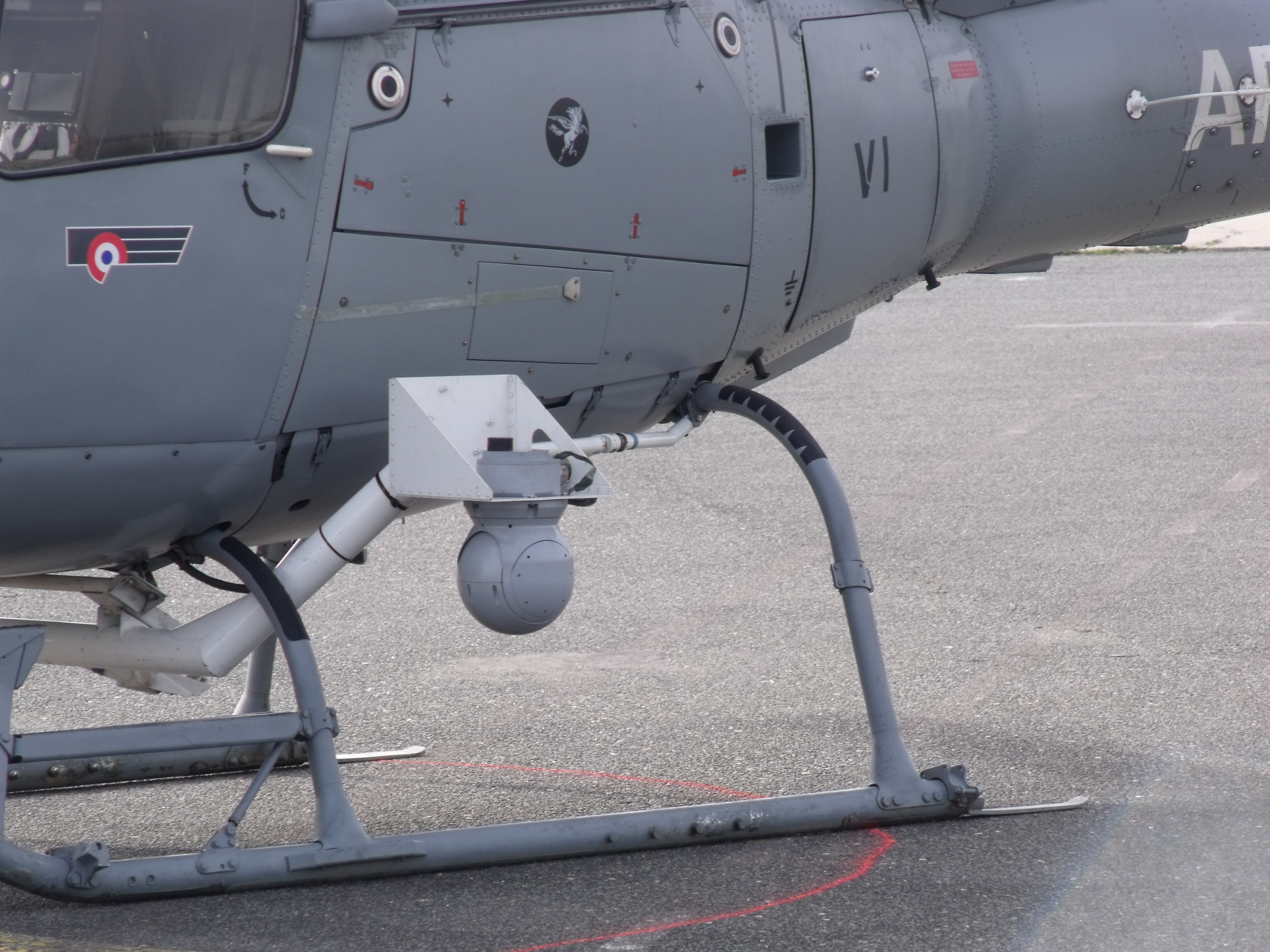 vu au bourget en mars 2011